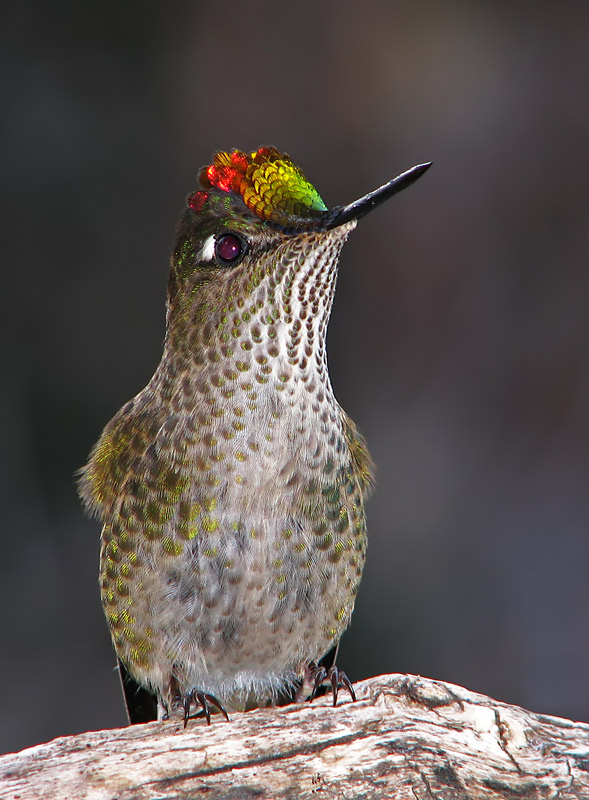 picaflor colibri rubi (Sephanoides sephaniodes). foto captada en la zona de san martin de los andes, provincia de Neuquen, Argentina